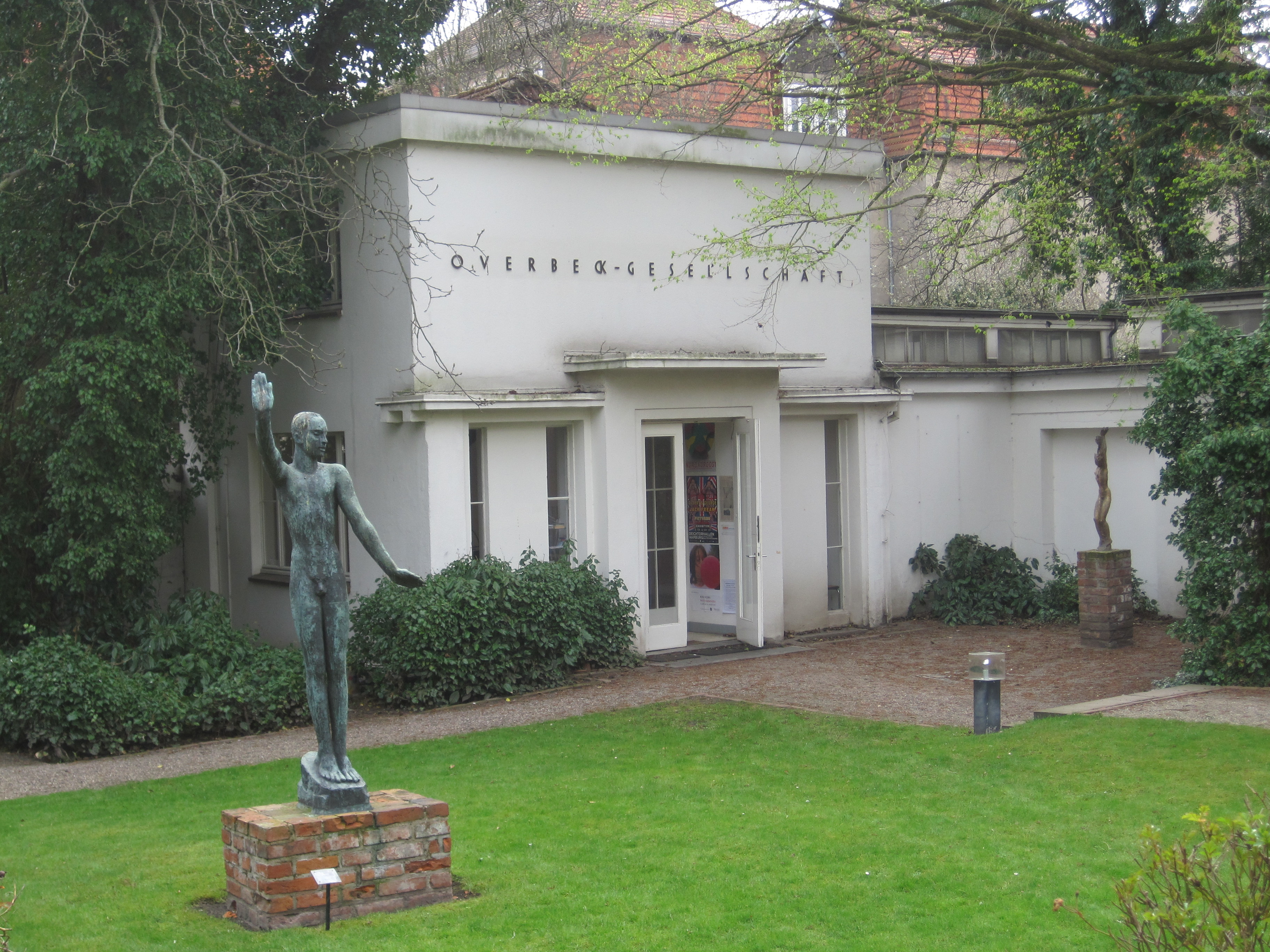 Pavillion der Overbeck-Gesellschaft in Lübeck, in den Bürgergärten hinter dem Behnhaus. Architekt Wilhelm Bräck (1930). Im Vordergrund Georg Kolbe: Verkündung (1924), eine Replik seines Denkmals für gefallene Buchhändler des Ersten Weltkriegs in Leipzig.